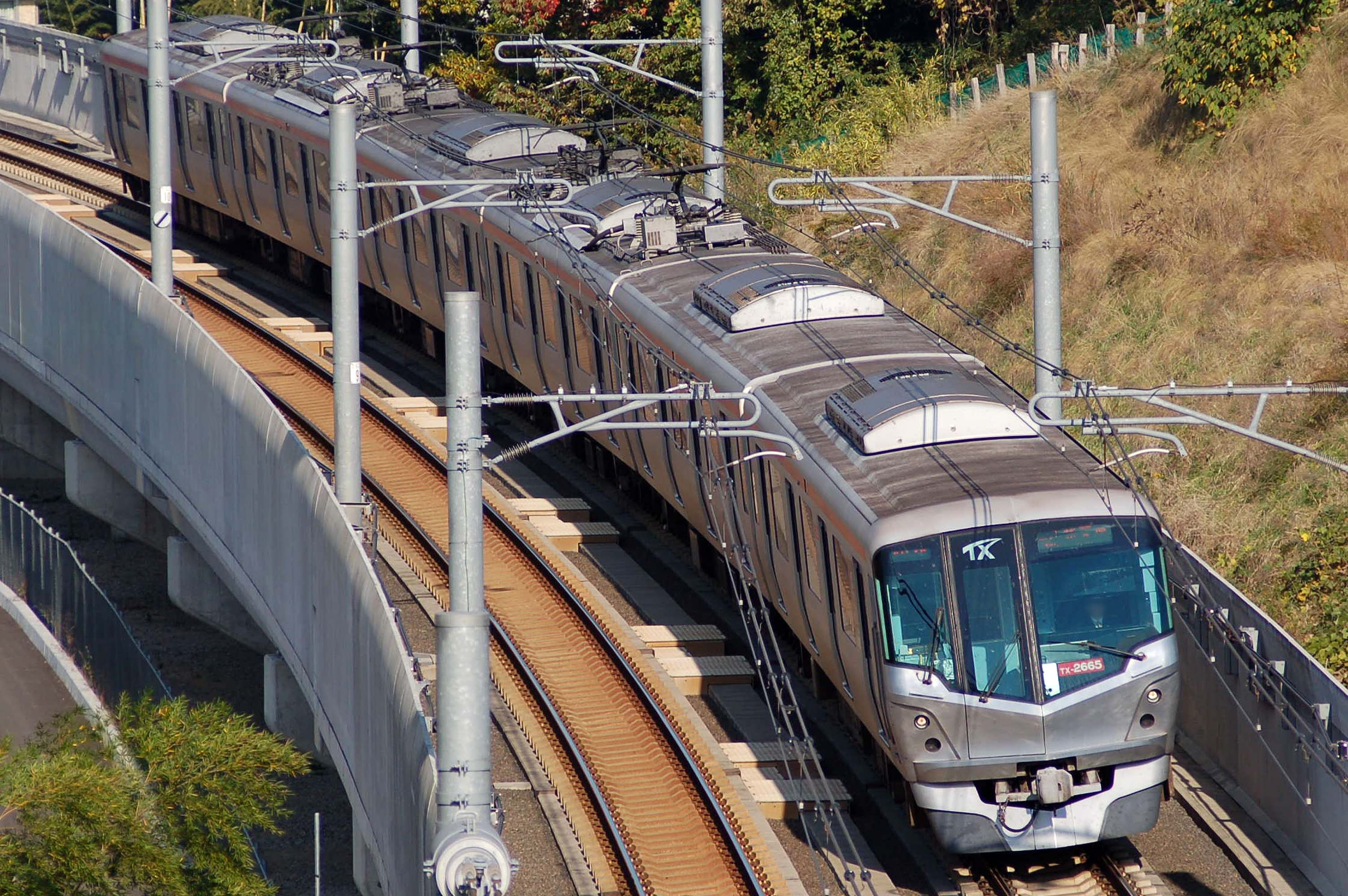 Tsukuba Express type 2000 electric car. つくばエクスプレス2000形電車。